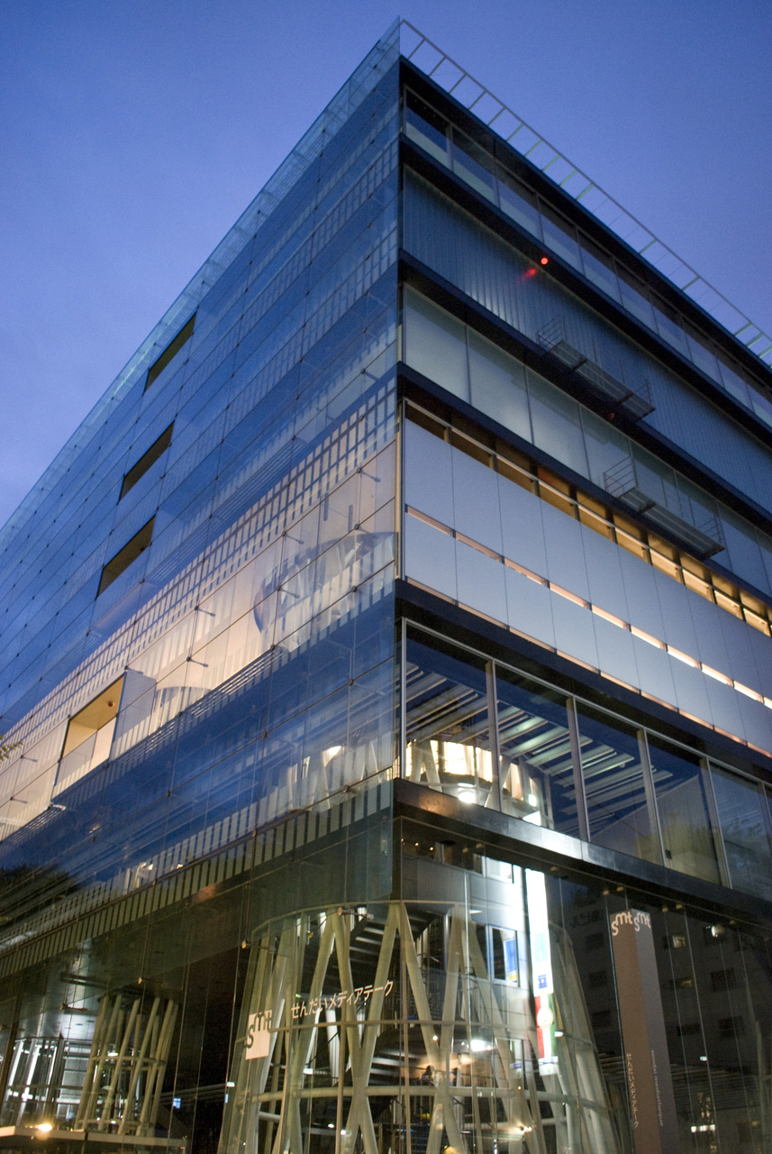 Sendai Mediatheque, Sendai-shi, Miyagi-pref., Japan